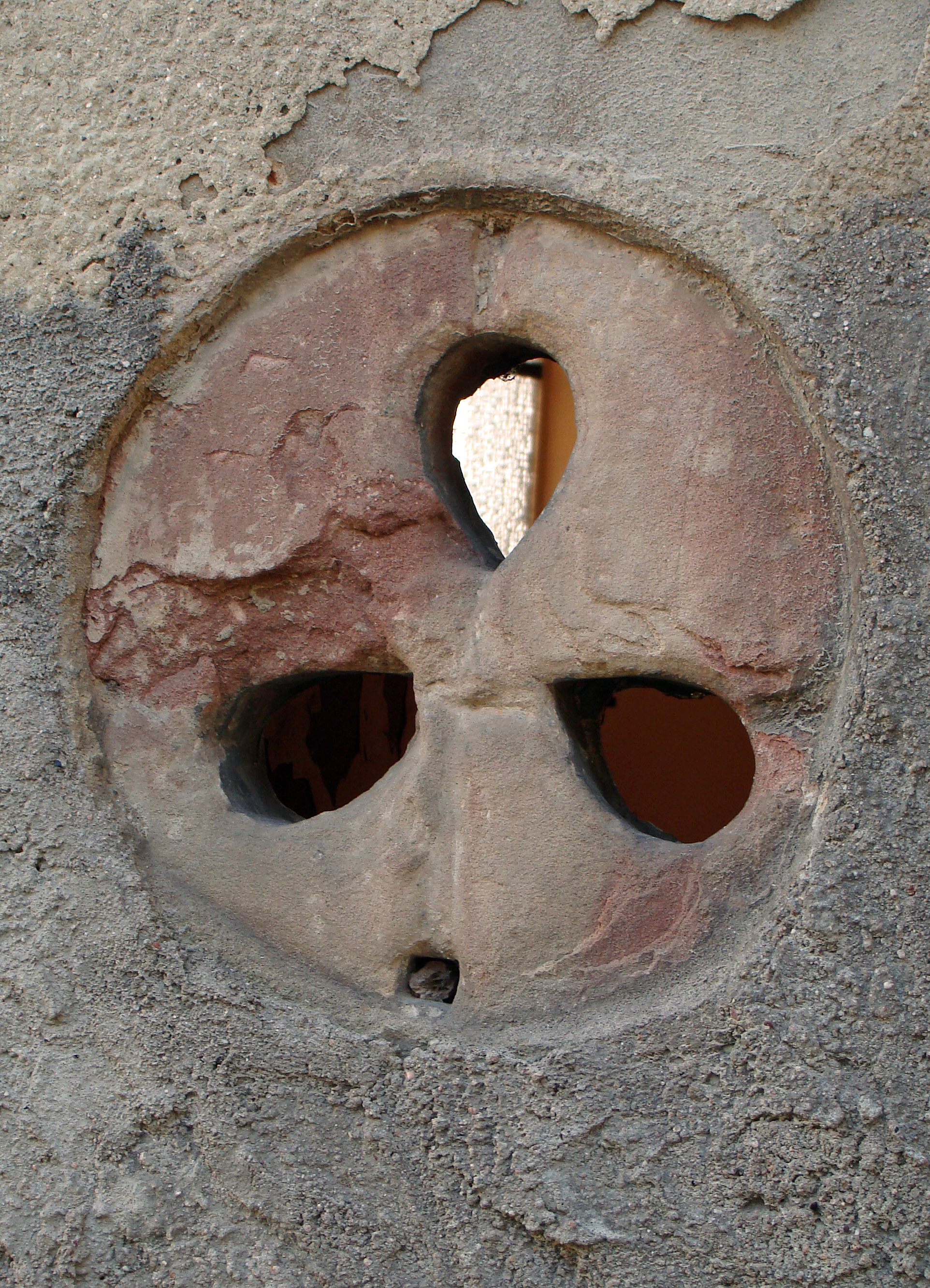 Hagioscope du choeur de l'ancienne église Saint-Maurice de Freyming, commune de Freyming-Merlebach (Moselle).